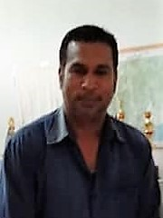 Arantes Isac Sarmento, Administrator der Gemeinde Manufahi